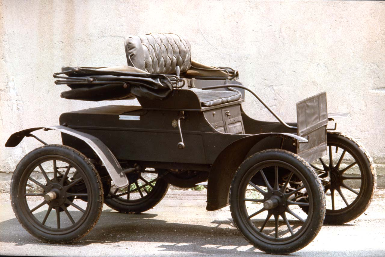 Autovettura con corpo in legno a pianta rettangolare e ampi parafanghi in lamiera a copertura delle ruote; sia la cassa in legno che i parafanghi sono verniciati di nero. Il corpo del veicolo poggia su due lunghe sospensioni a balestra longitudinali, fissate agli assi delle ruote; l'avantreno, inoltre, comprende un ulteriore ammortizzatore a balestra collegato direttamente alla leva di sterzo. Le ruote presentano cerchi e raggi in legno e gomme pneumatiche. Il motore è posizionato al di sotto del corpo del veicolo ed è costituto da un solo cilindro, con trasmissione a catena sulle ruote posteriori; la manovella per l'accensione del motore è collocata lungo il fianco destro dell'automobile. La vettura è dotata di un sedile imbottito a due posti affiancati, posizionato nella parte superiore del corpo in legno; una cappottina pieghevole in tela può essere aperta per coprire il sedile dei passeggeri; due pradelline sono fissate lungo i lati del veicolo per consentire di montare a bordo. Il posto di guida è dotato della leva dello sterzo e di tre pedali, sistemati nella parte destra del piano dell'abitacolo. Notizie storico-critiche L'Oldsmobile Straight Dash fu il modello, apparso nel 1906, che seguì la precedente Curved Dash, la prima automobile prodotta in grande serie a partire dal 1901. Dal punto di vista estetico, questo modello si differenzia dal precedente principalmente per le linee rette del lato anteriore, particolare da cui deriva il nome della vettura.